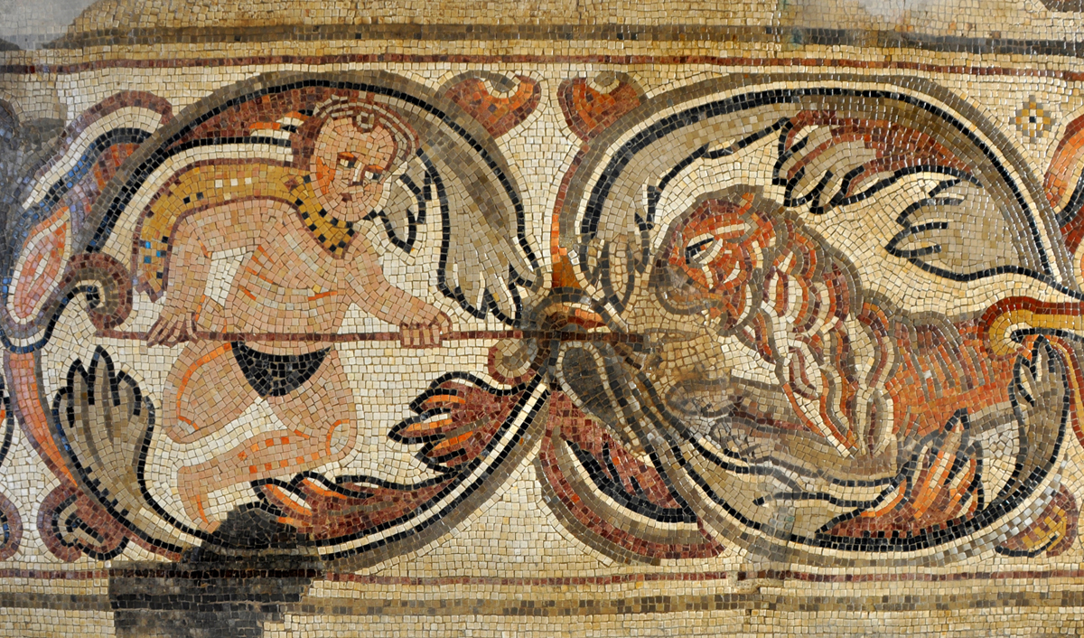 כנסייה מהתקופה הביזנטית ששרידיה נמצאו בשנת 1964 בשכונת "גבעת כצנלסון" בנהריה. שרידי הכנסייה מהמאה השישית כללו רצפת פסיפס הכוללת דמויות אדם ודמויות מעולם החי והצומח ודגמים גאומטריים. פסיפס צייד עירום צד נמר